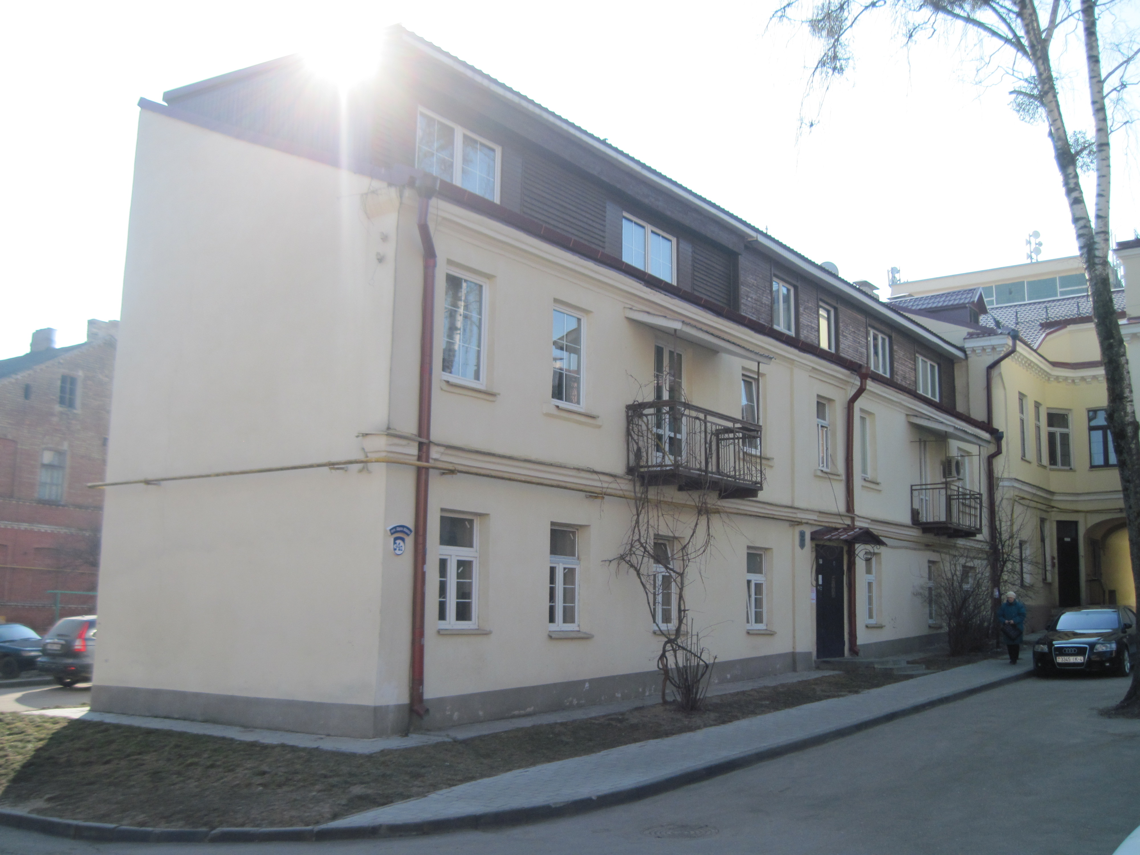 Забудова гістарычнага цэнтра Гродна. Вуліца К. Маркса, 34А